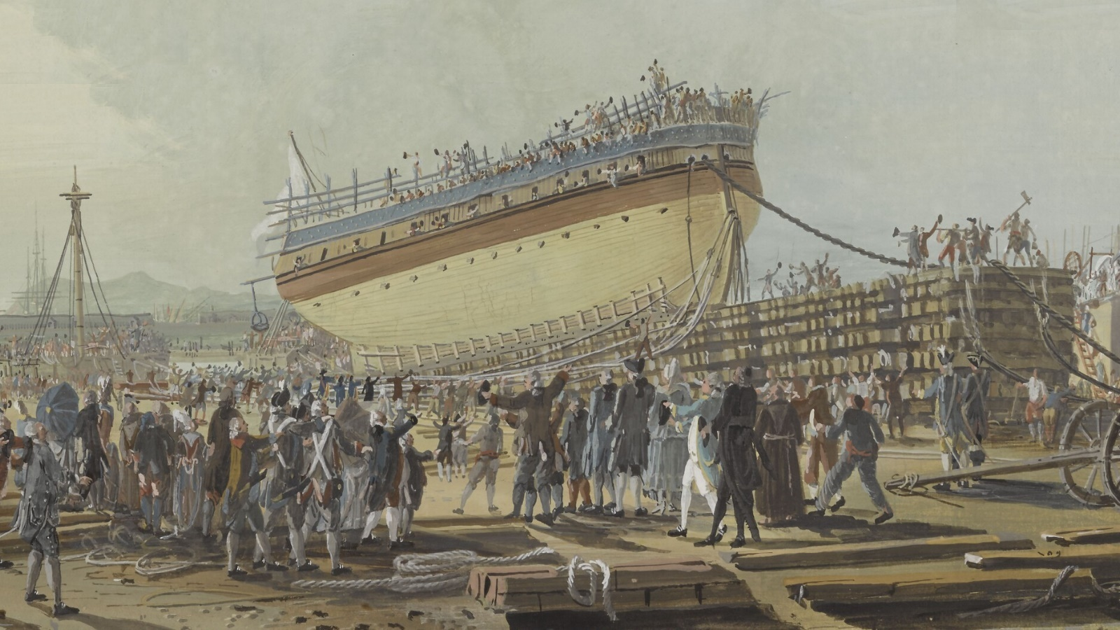 Détail d'une gouache réalisée en 1777 lors des festivités données en l'honneur du comte de Provence. Lancement du vaisseau de 64 canons le Caton. Vaisseau sur cale depuis 1770, mais lancé seulement en juillet 1777.